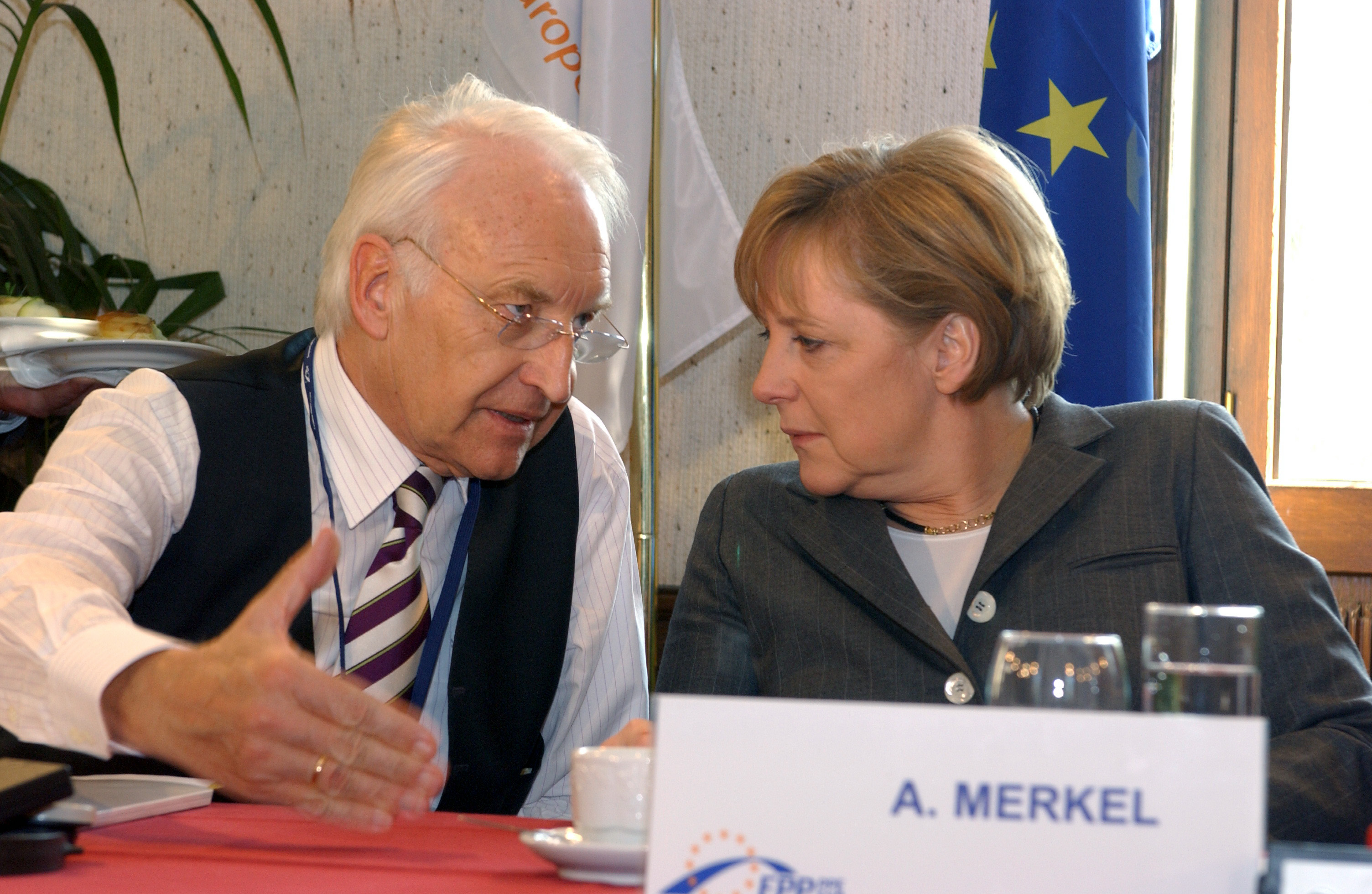 EPP Summit 23 March 2006